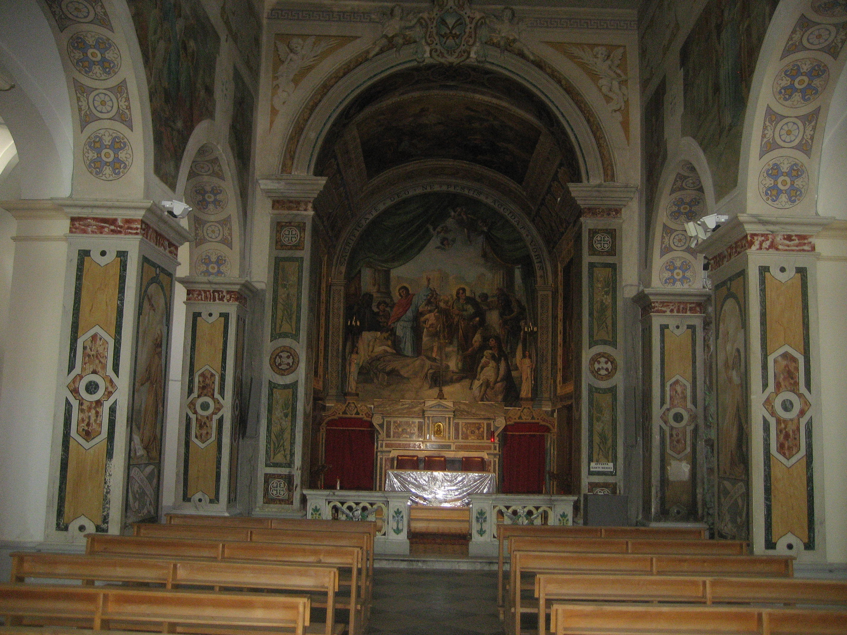 Chiesa_Riace_interno